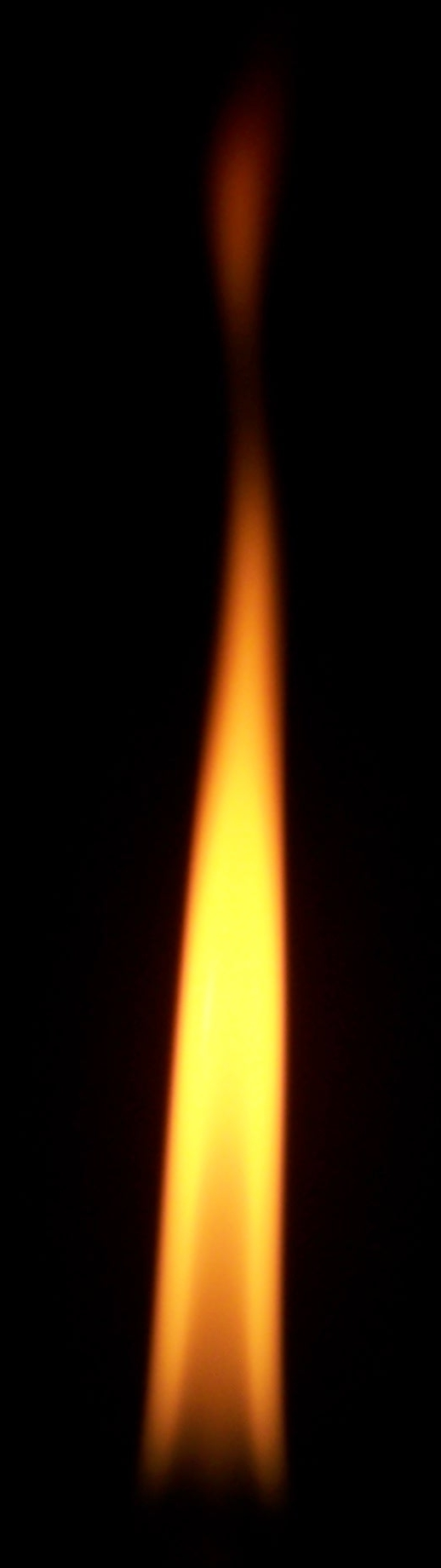 Bild einer klassischen Flamme